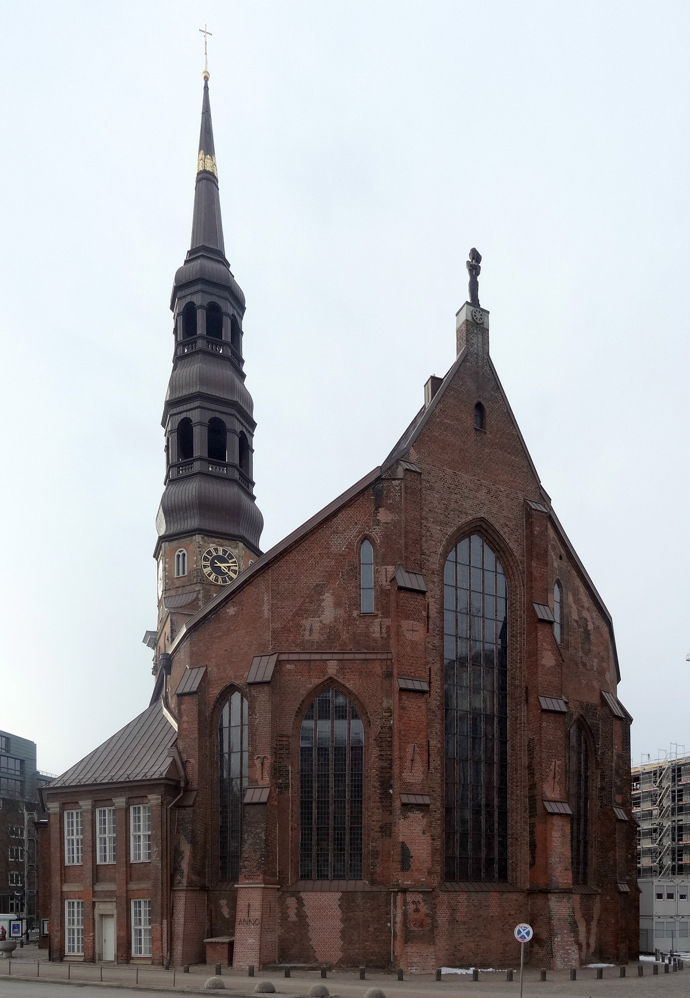 Hauptkirche Sankt Katharinen (Hamburg)